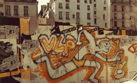 palissade VLP Paris - années 1980